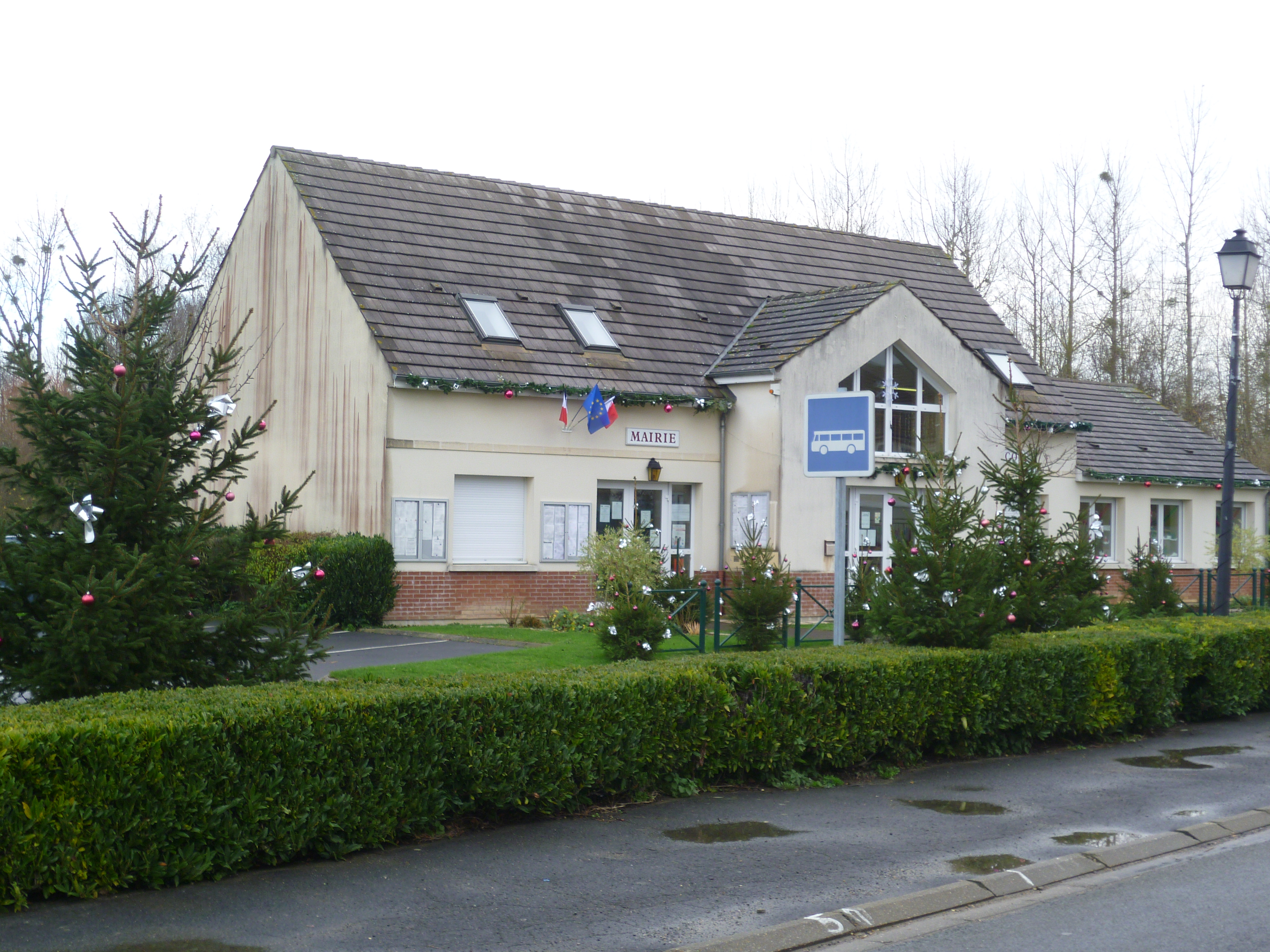 Mairie et Ecole Maternelle inaugurées en 1995